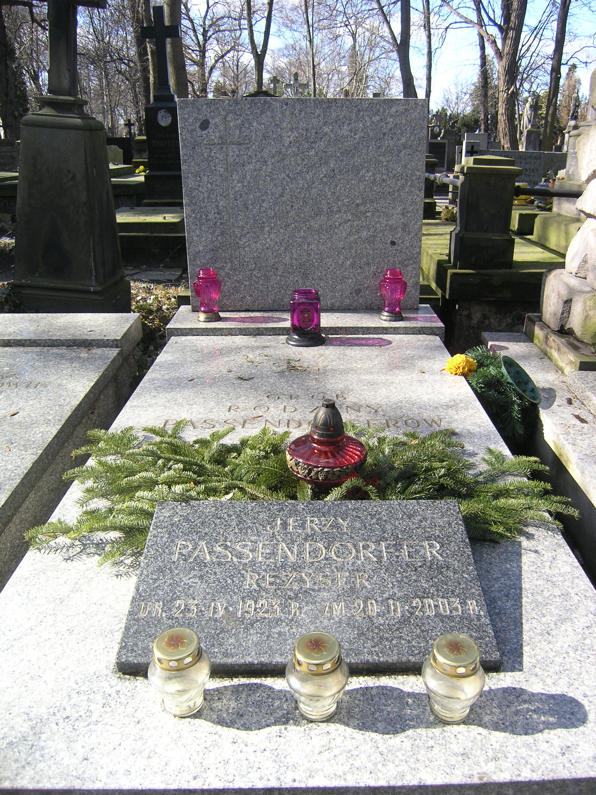 Grób reżysera Jerzego Passendorfera na Cmentarzu Powązkowskim w Warszawie (marzec 2012)